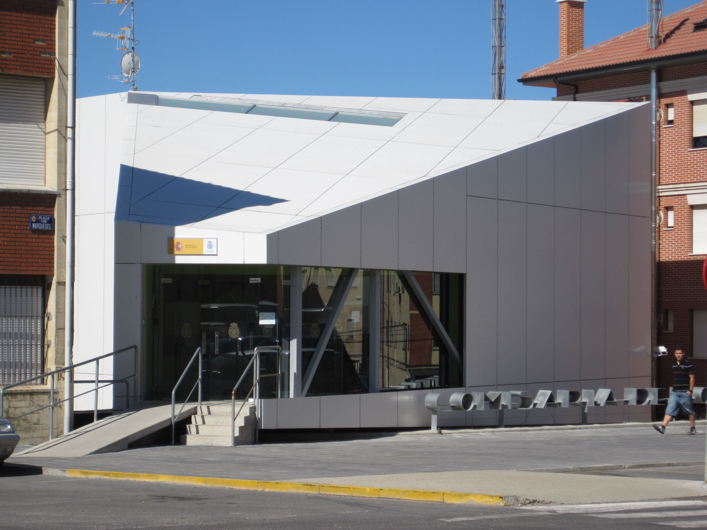 Comisaría de la Policía Nacional en Astorga (provincia de León, Castilla y León, España).